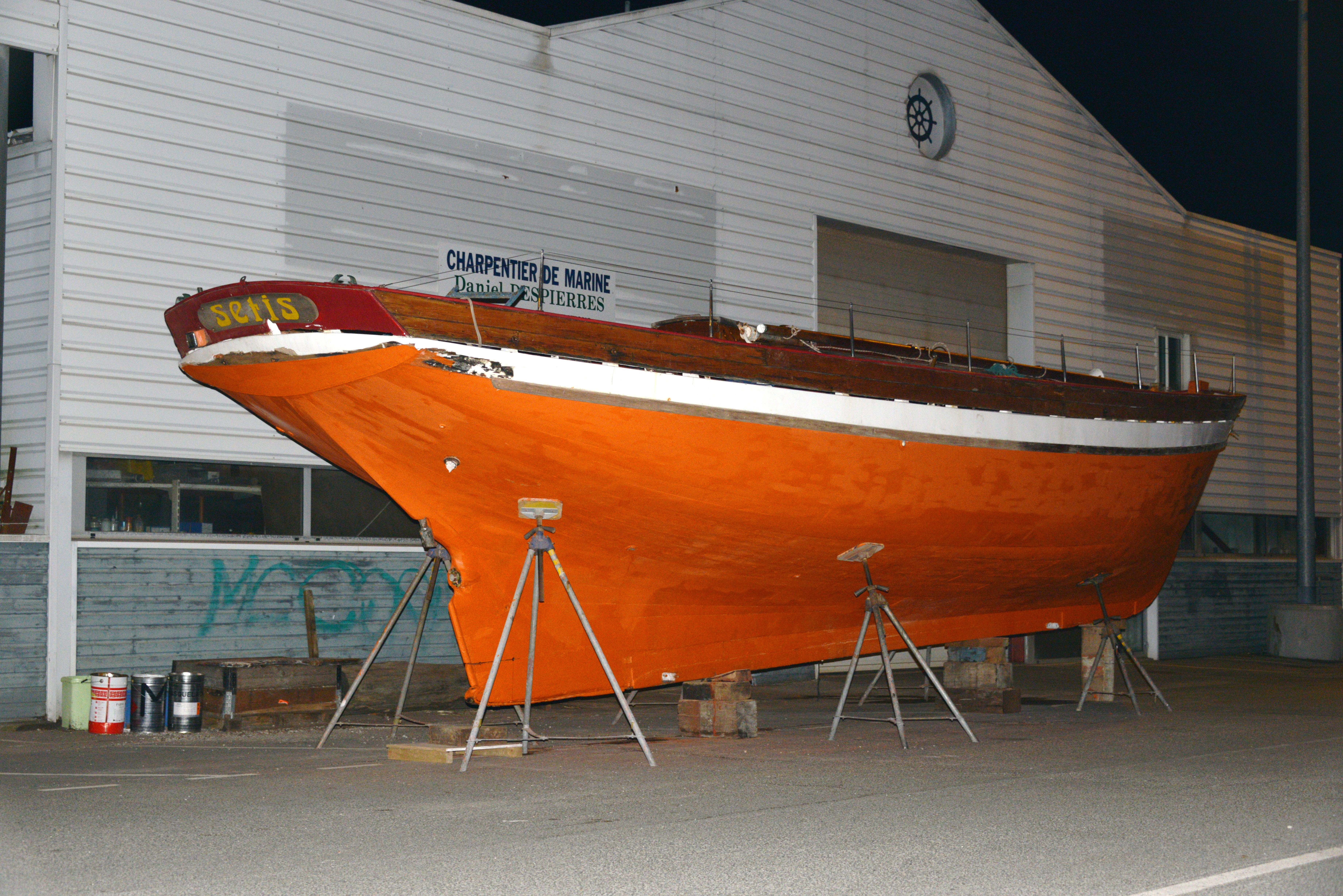 La coque du dundee « SETIS » sur laquelle une couche de peinture de protection (du minium orange) a été passée. Photographie prise de nuit. La Rochelle (Plateau nautique de la Ville en Bois), Charente-Maritime, France.